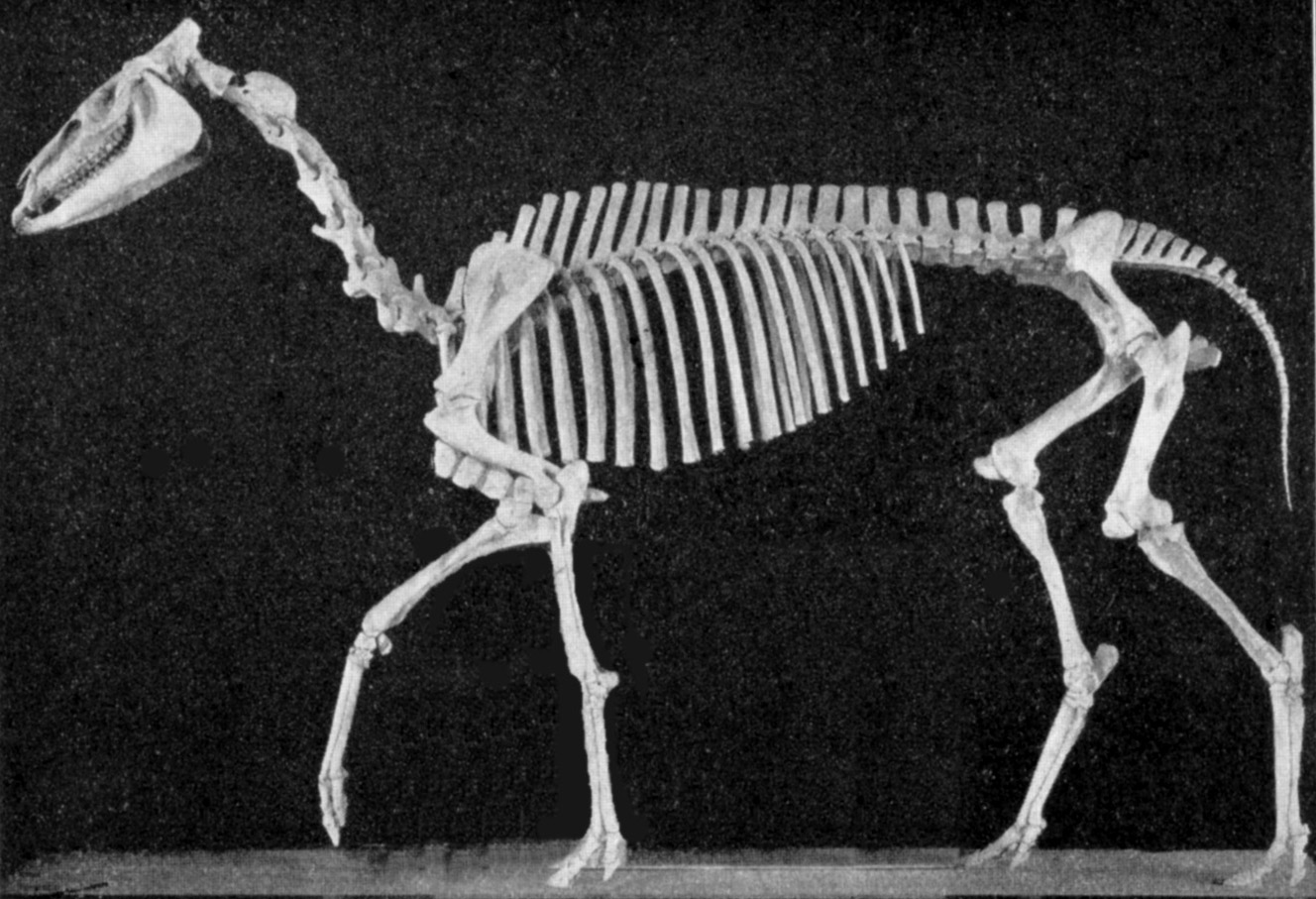 Hypohippus osborni skeleton.